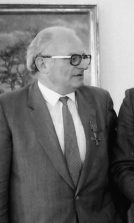 Egon Hugenschmidt bei der Verleihung des Bundesverdienstkreuzes in Freiburg 1980